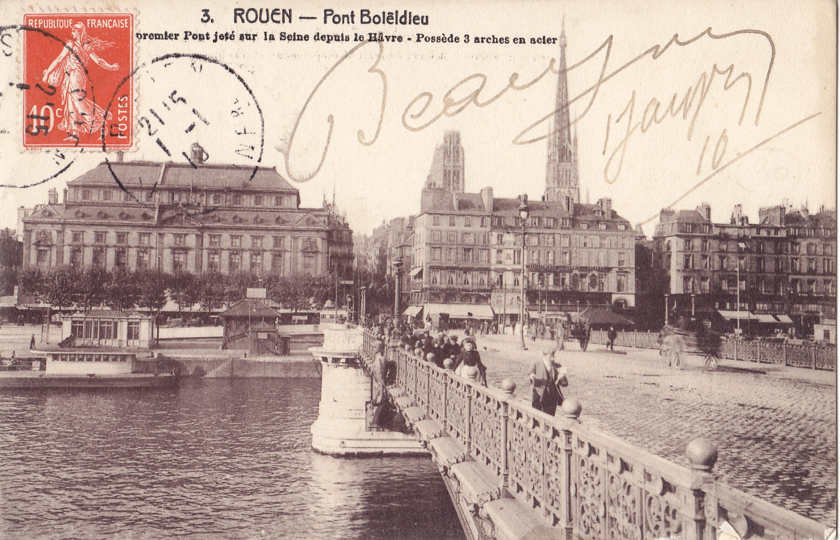 Carte postale ancienne sans mention d'éditeur, n°3 :ROUEN - Pont Boieldieu